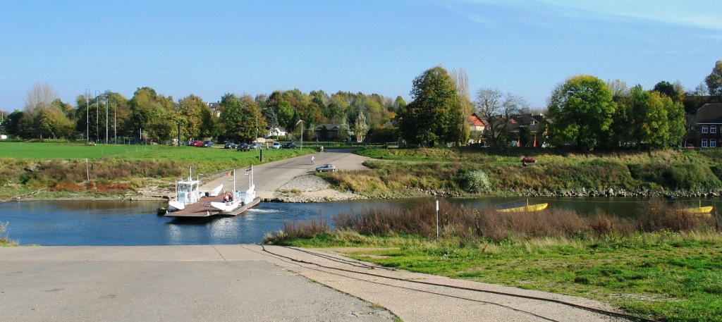 Veerpont te Maasmechelen (Meeswijk) - eigen foto